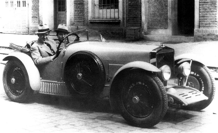 Voskovec a Werich, známí humoristé—umělci z Prahy při zájezdu do Prostějova, kde sehráli 16. a 17. května 1930 s velikým úspěchem revue „Ostrov Dynamit“ a „Fata morgana“, navštívili tamní automobilku Wikov. Na obrázku jsou zachyceni v supersportu Wikov 7/28, který svými ladnými liniemi budil značnou pozornost v závodě Zbraslav—Jíloviště, v jehož národním závodě docílil nejlepšího času ze všech vozů domácích značek.